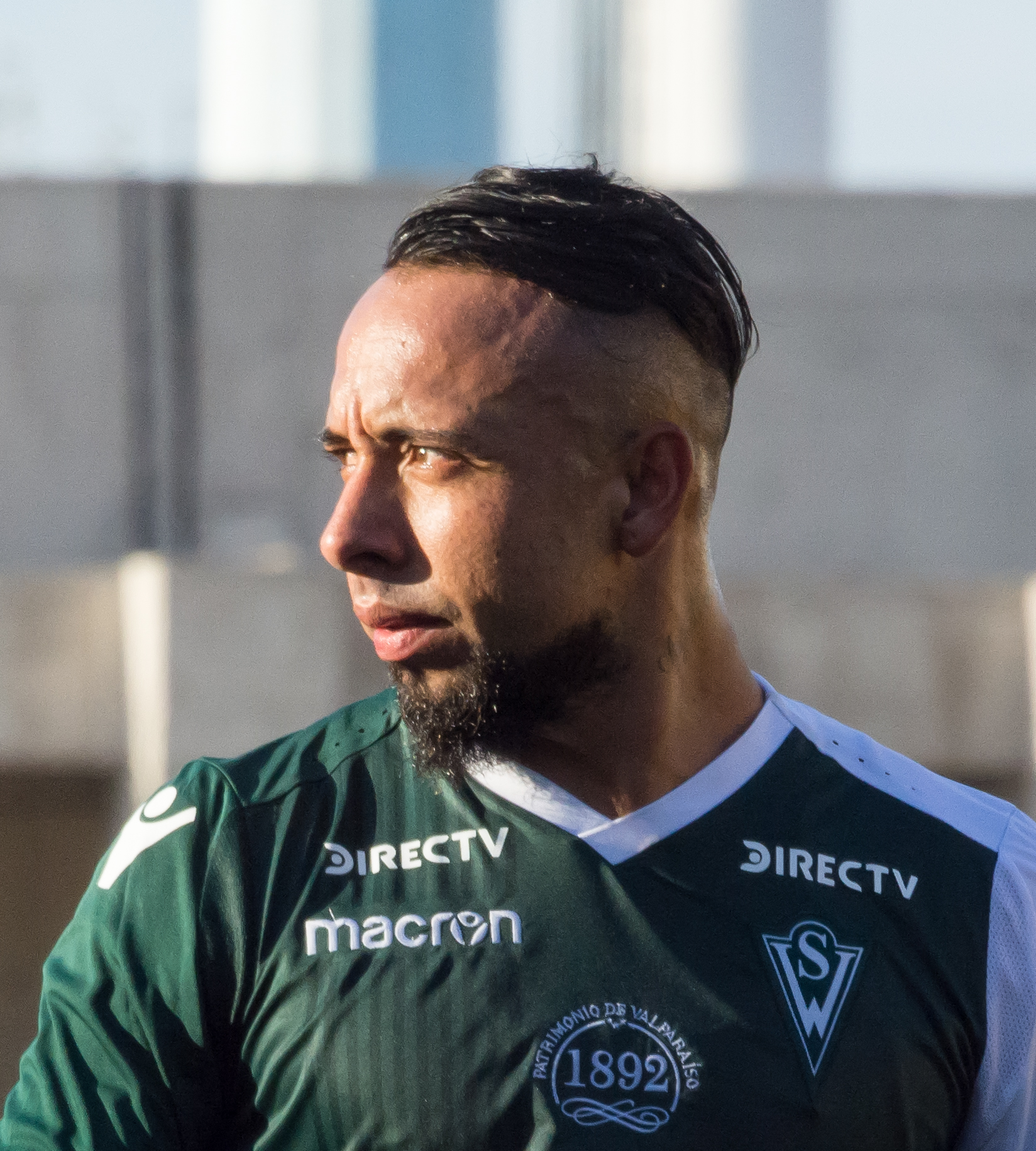 Bernardo Cerezo, San Luis v Santiago Wanderers, Estadio Municipal Lucio Fariña Fernández, Quillota, Región de Valparaíso, Chile.